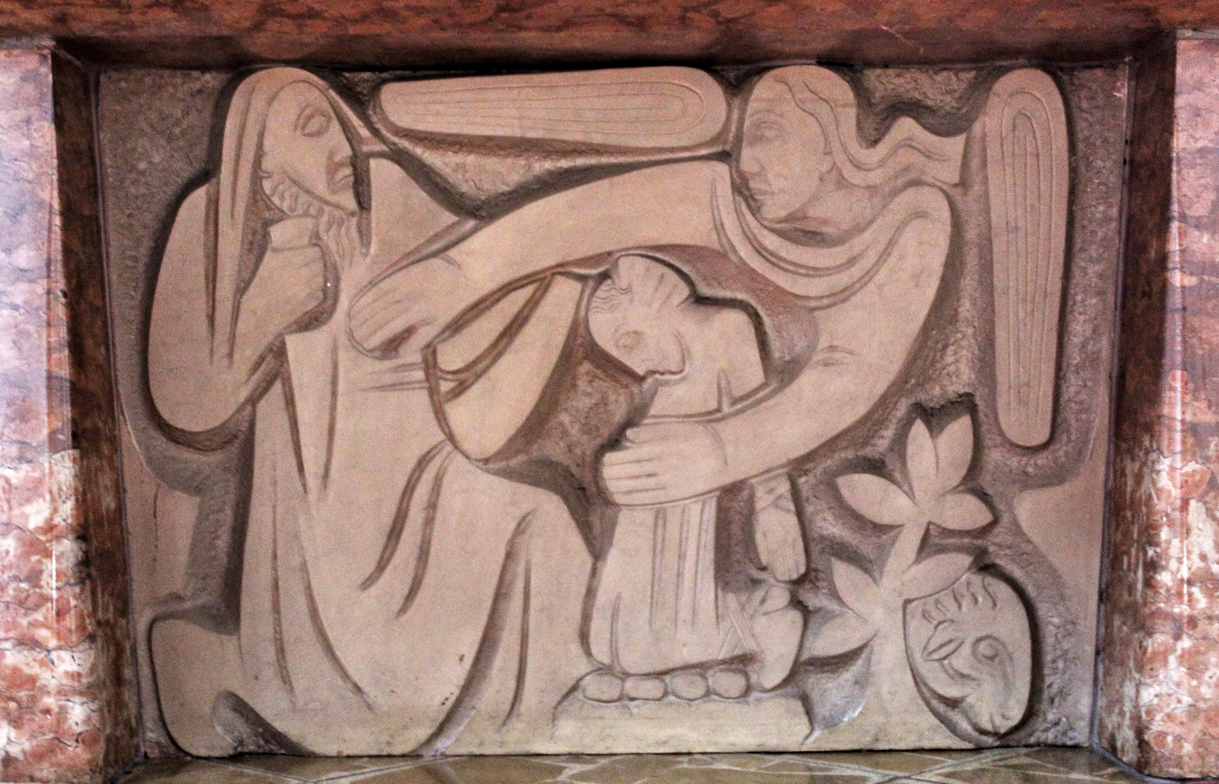 St. Nikolaus Veringenstadt. Hochaltar aus Trientiner Marmor mit eingelassenem Relief „Isaaks Opferung“. Eine Arbeit des Bildhauers Oskar Steidle aus Schwenningen (Heuberg) aus dem Jahre 1956.